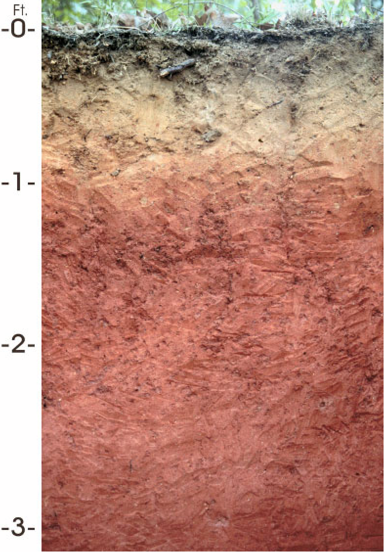 Bama Soil Profile